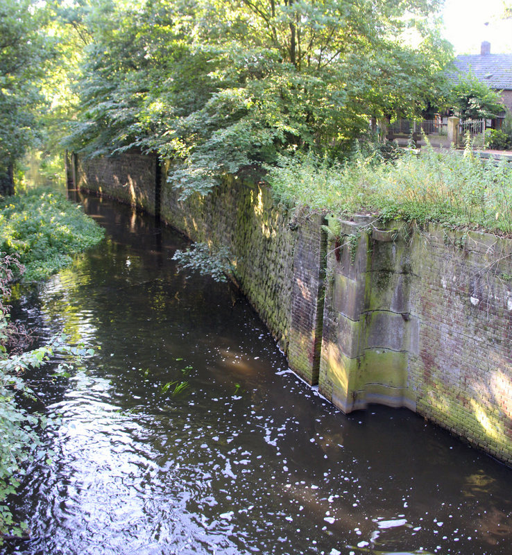 In het Afwateringskanaal zijn aanvankelijk twee sluizen aangelegd. Één bij de Noordervaart en één hier bij Neer. Een kwart eeuw later werden de houten sluizen vervangen door stenen. De sluisdeuren hebben inmiddels plaats gemaakt voor een stuw.